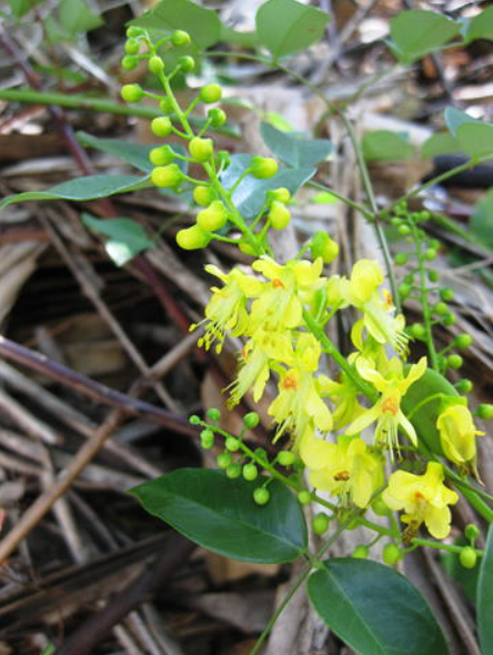 ナンテンカズラの花